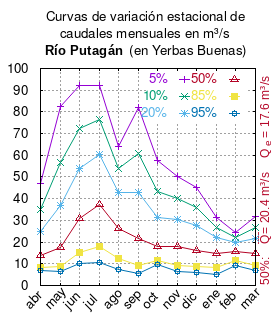 Curva de Variación Estacional Río Putagán en Yerbas Buenas. # cita publicación # | apellido = Dirección General de Aguas # | nombre = # | enlace-autor = Ministerio de Obras Públicas (Chile) # | título = Diagnóstico y clasificación de los cursos y cuerpos de agua según objetivos de calidad. Cuenca del río Maule # | ubicación = Santiago de Chile # | editorial = Ministerio de Obras Públicas (Chile) # | año = 2004 # | edición = # | url = # | ref = harv # Tabla 4.14: Río Putagán en Yerbas Buenas (m3/s) pág. 64 mes 5% 10% 20% 50% 85% 95% abr 47.154 34.925 24.740 13.866 8.240 6.750 may 82.389 56.831 36.809 17.315 8.547 6.521 jun 92.159 72.307 53.897 30.737 15.390 10.251 jul 92.068 76.343 60.353 37.159 18.146 10.392 ago 63.899 53.719 42.860 26.278 12.631 7.547 sep 81.889 61.048 42.773 21.671 9.379 5.735 oct 57.775 43.346 31.241 18.174 11.299 9.449 nov 50.246 40.015 30.370 17.928 9.367 6.397 dic 45.252 36.138 27.520 16.350 8.610 5.908 ene 31.420 26.767 21.917 14.591 8.084 5.131 feb 24.375 22.258 19.810 15.600 11.292 9.188 mar 31.654 26.695 21.717 14.638 9.005 6.769 This plot was created with Gnuplot.